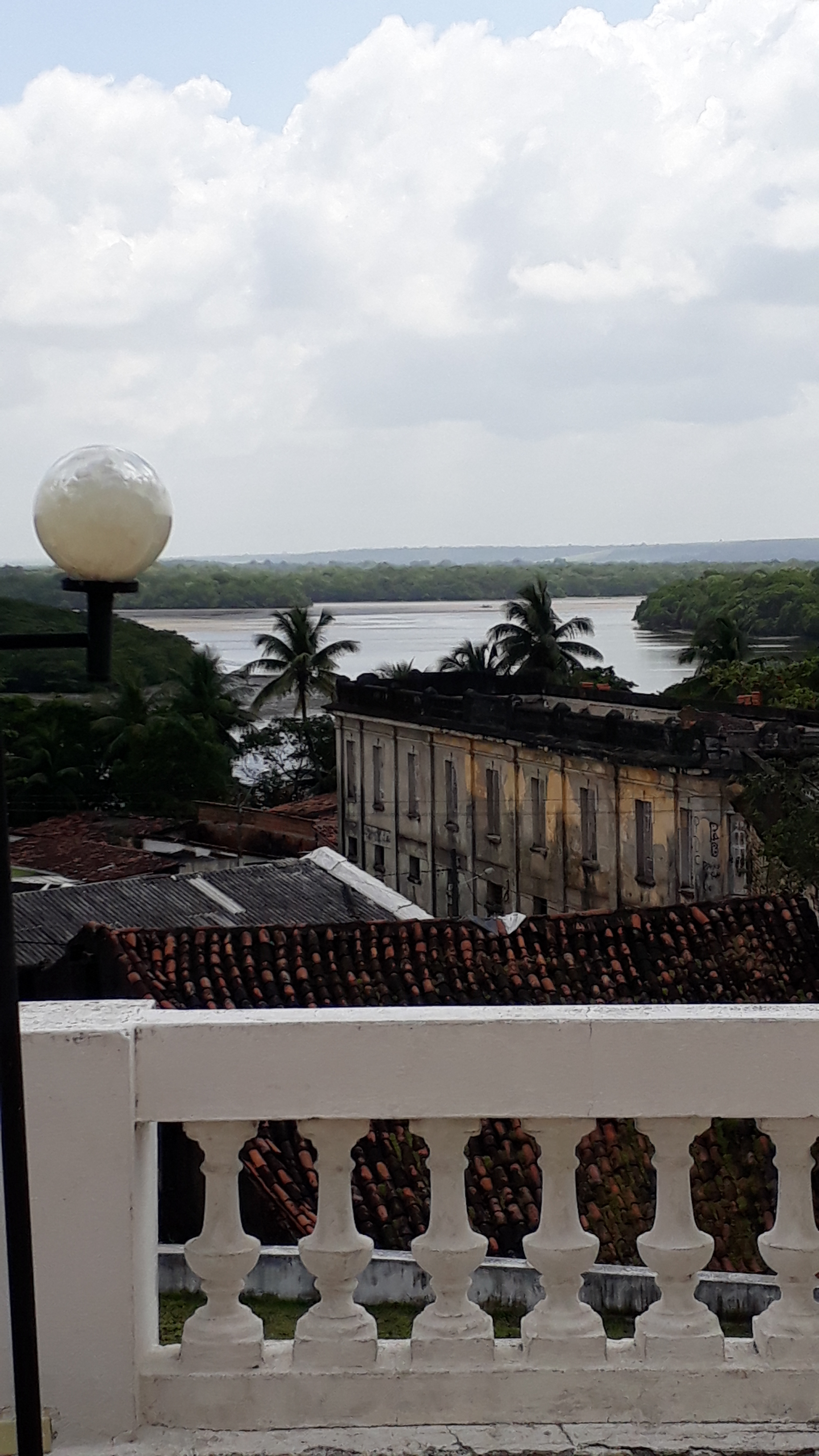 Vista do Hotel Globo, para o Rio Sanhauá